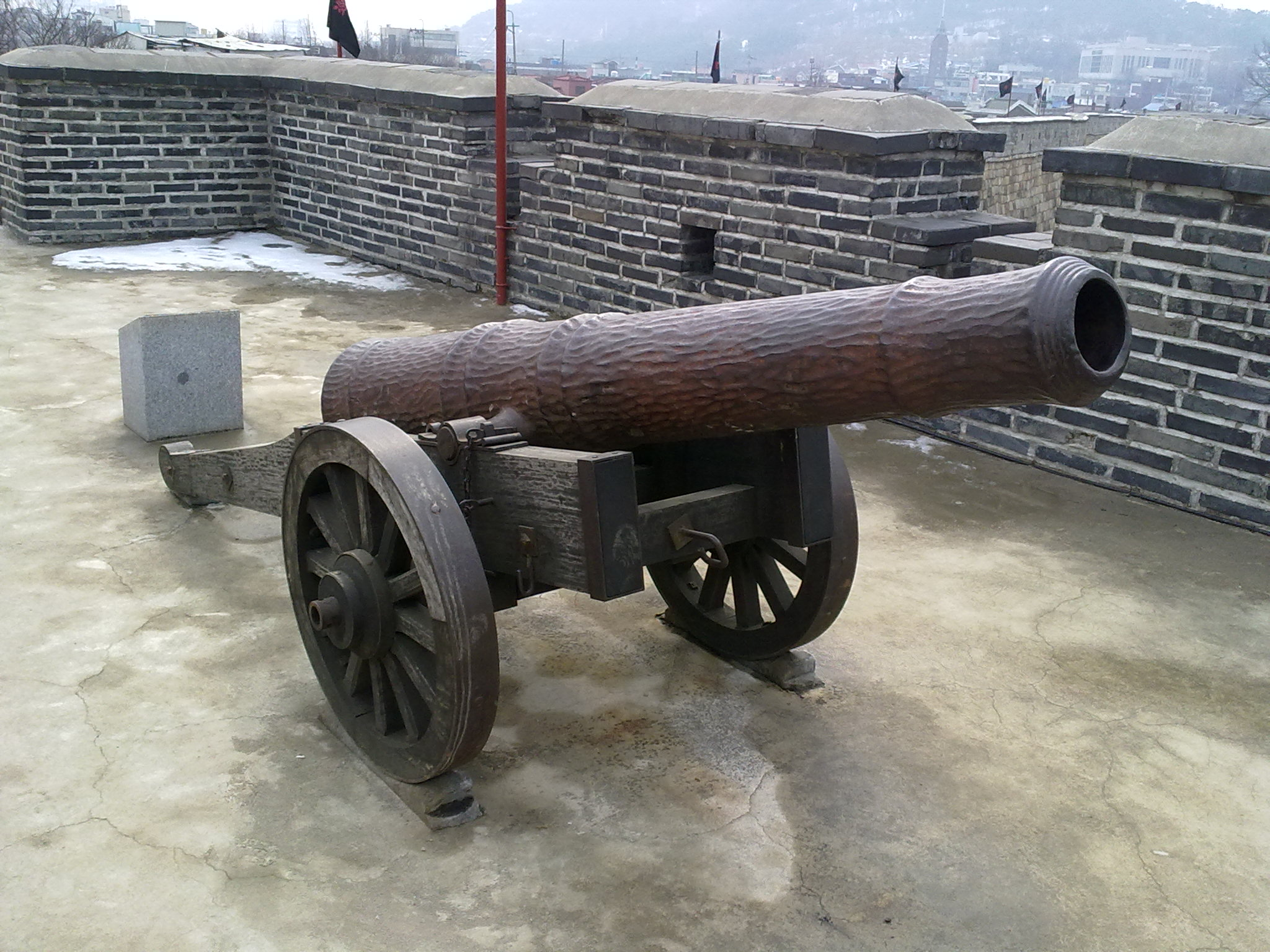 수원 화성에 있는 홍이포